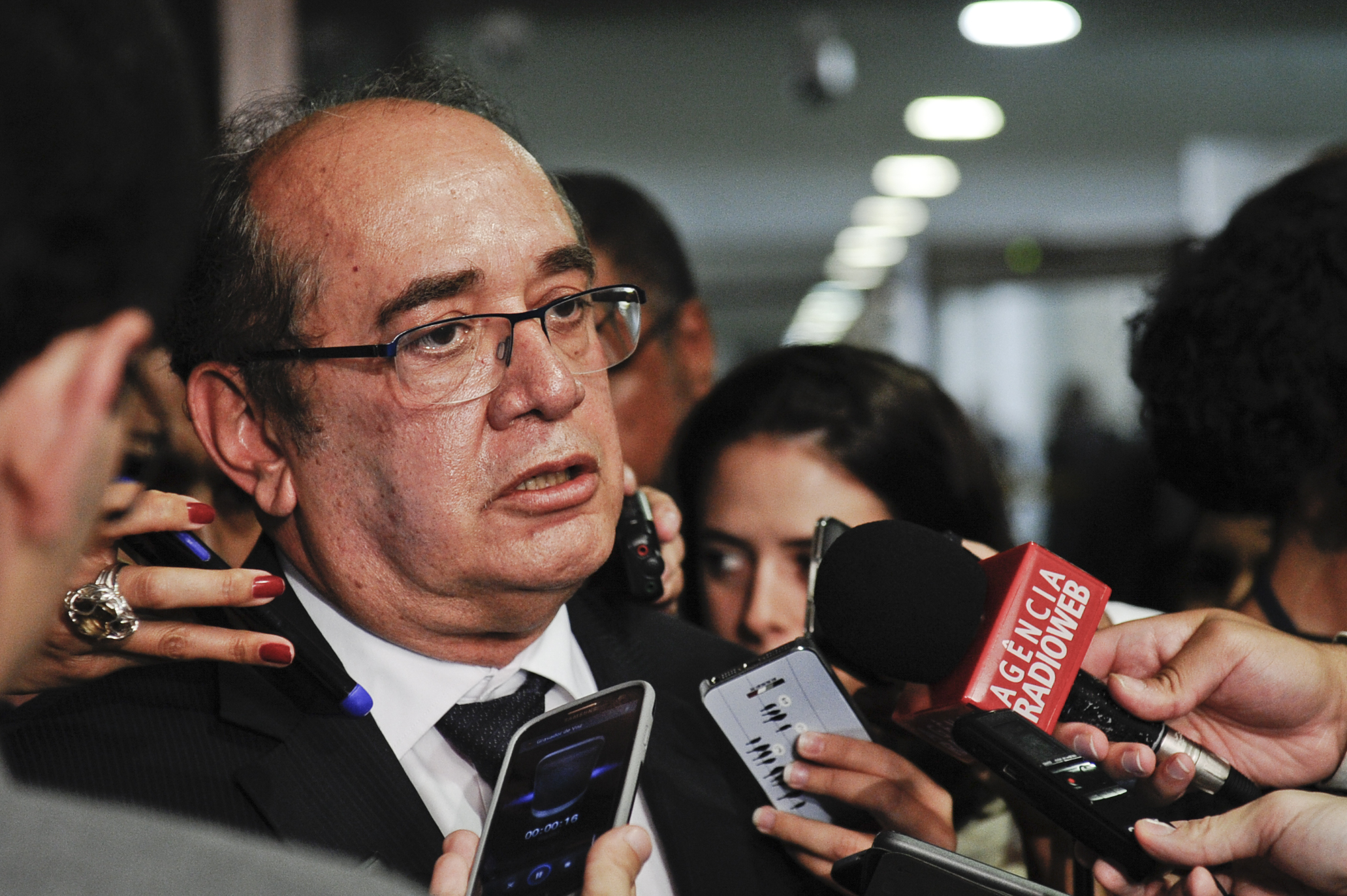 Ministro do Supremo Tribunal Federal (STF), Gilmar Mendes concede entrevista. Foto: Marcos Oliveira /Agência Senado